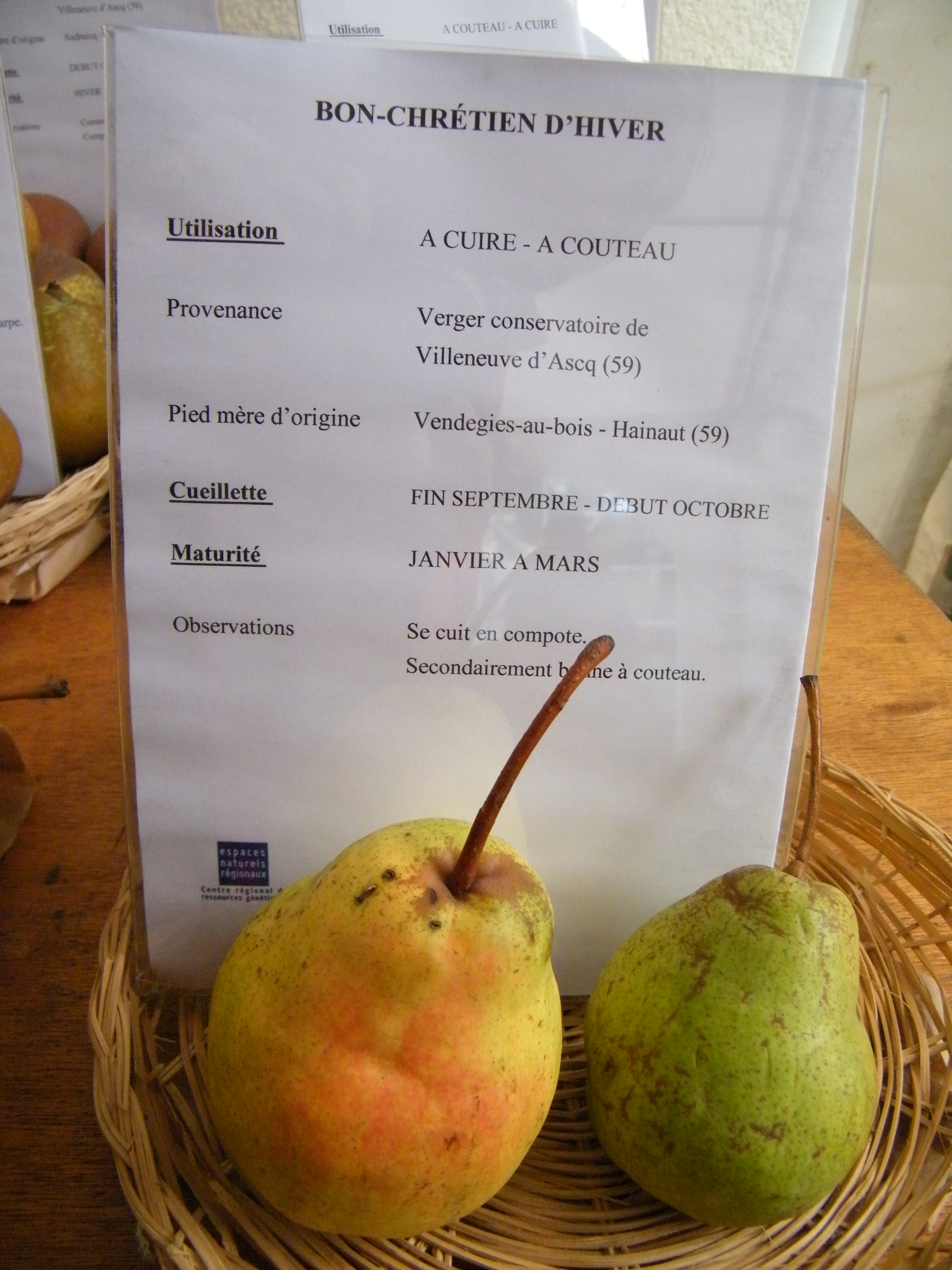 Bon Chrétien d'Hiver, Mons-Boubert, Somme, Fr, expo du 29-10-2017 (117)